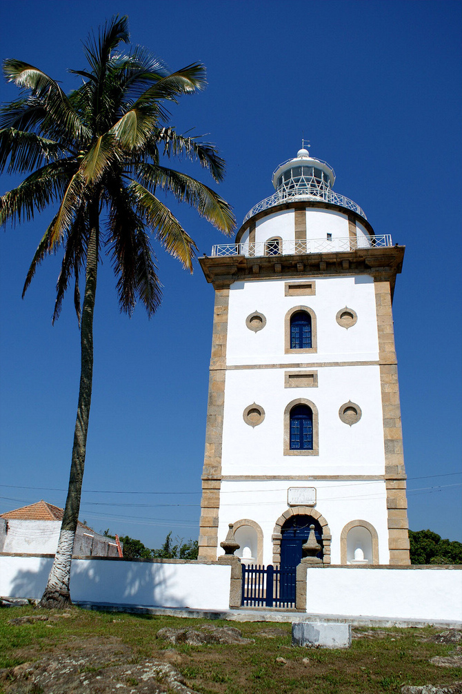 Farol da Ilha Rasa - RJ